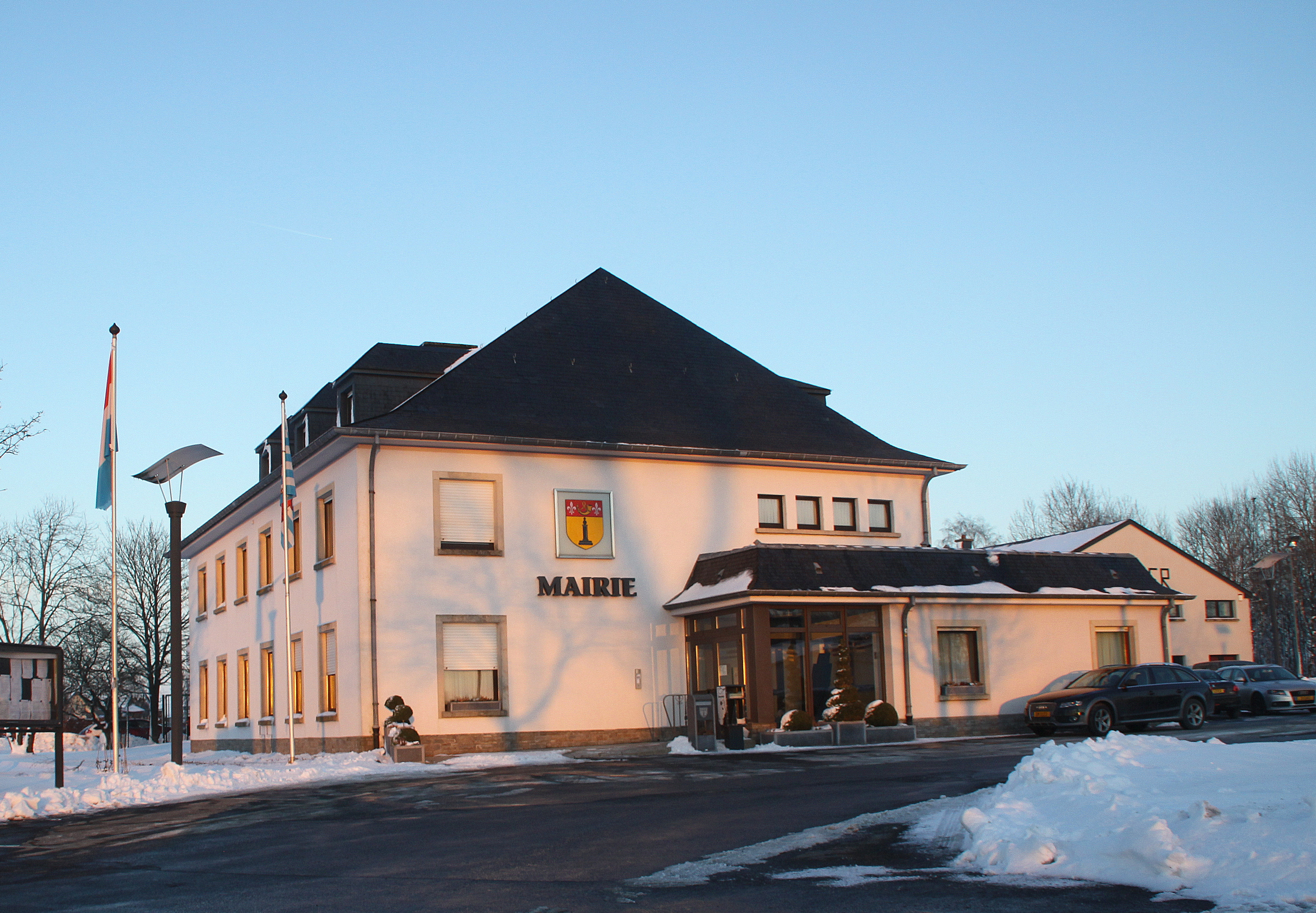 D'Märei vu Wëntger